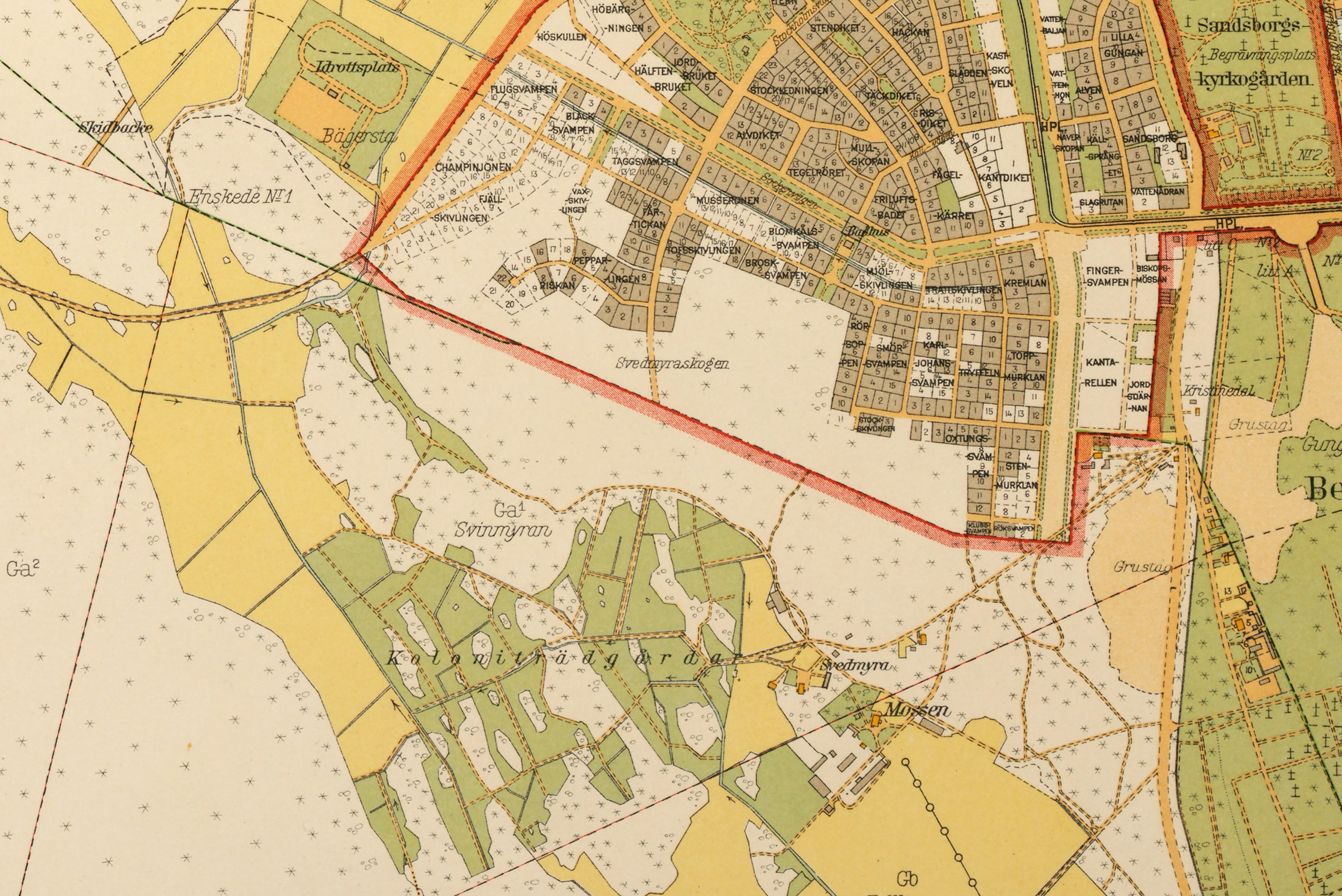 Del av Karta "Enskede" från 1917-1928 visande Svedmyraskogen